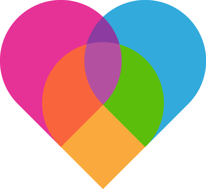 Lovoo Logo.